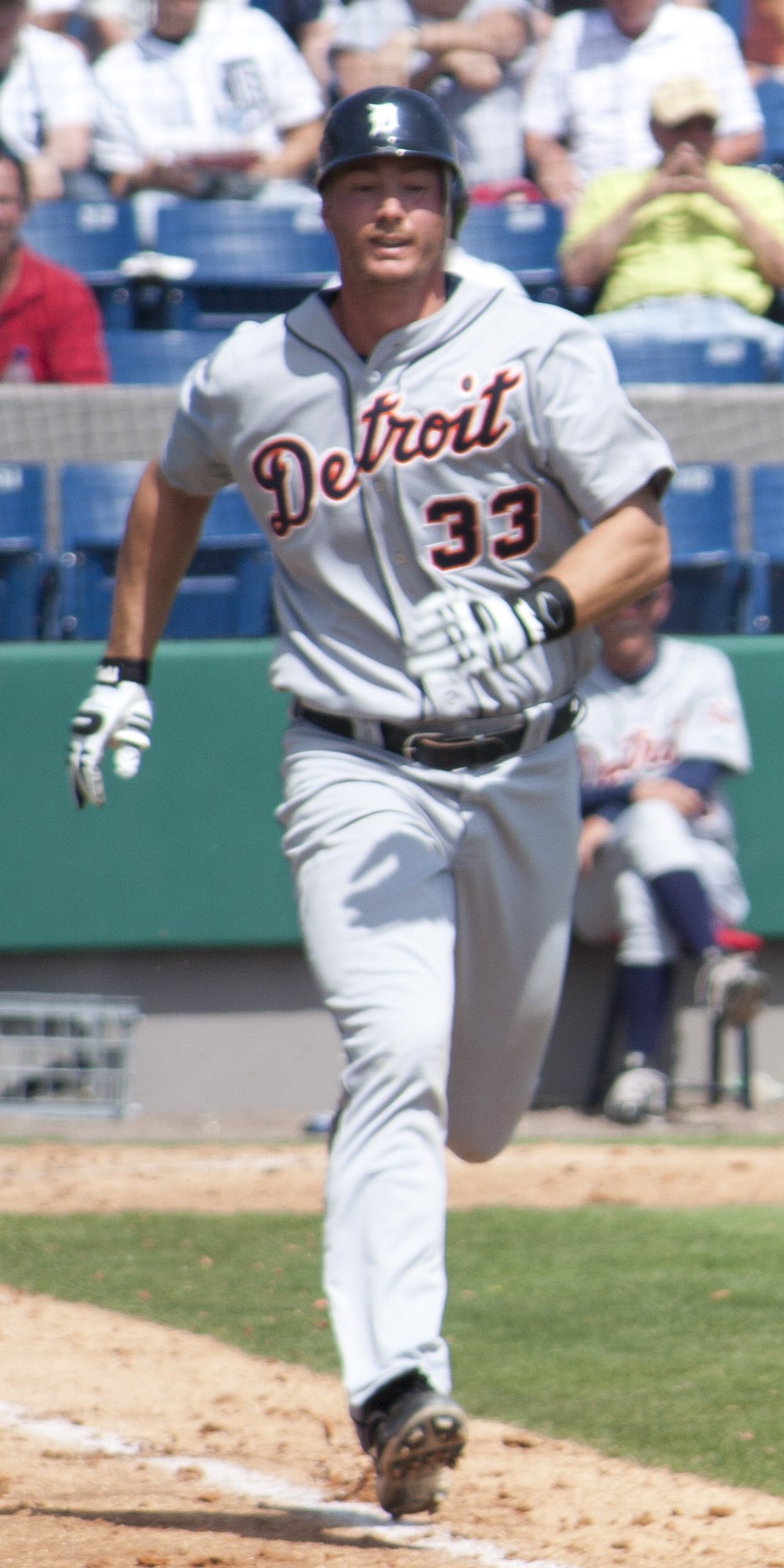 Ryan Strieby